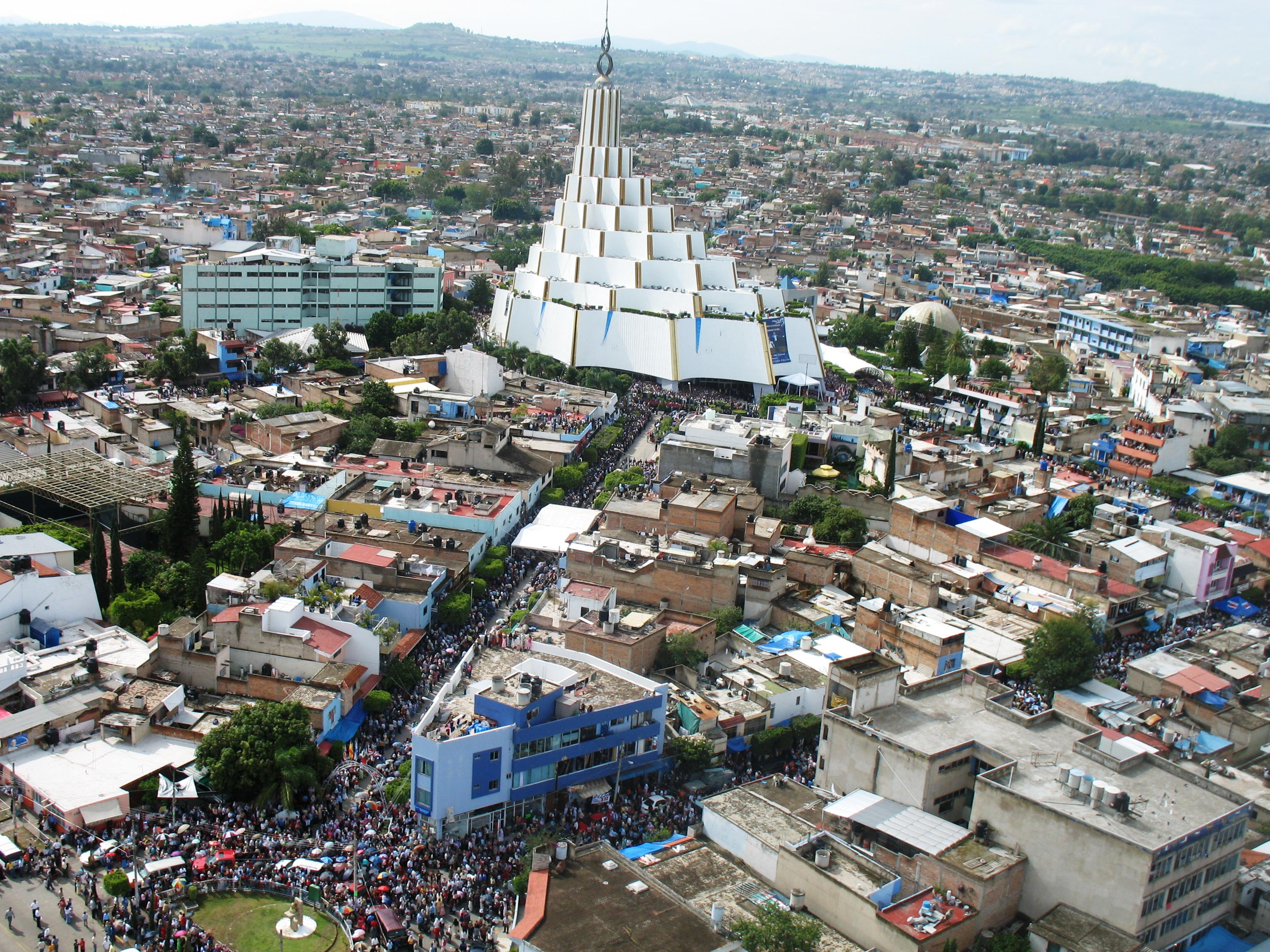 es considerado el mas grande de México y américa latina, mide 83 metros de altura y tiene una capacidad para albergar de 12 a 15 mil personas cómodamente sentadas. es considerada como una sona turística de guadalajara. jal